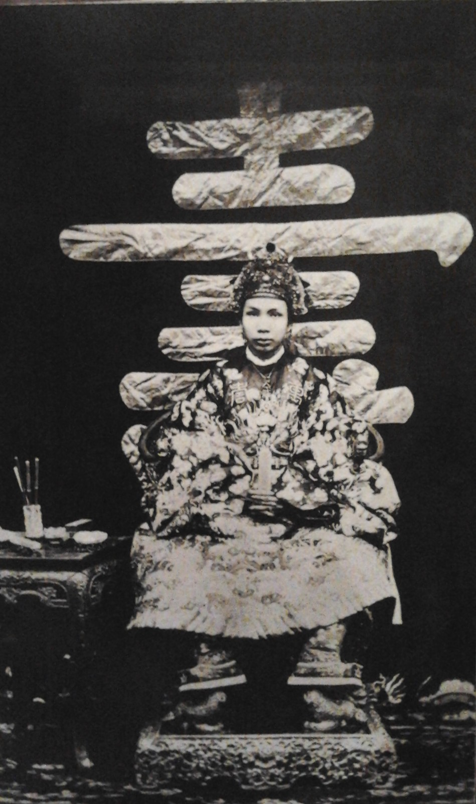 Intronisation du roi Dong Khanh (1885) - Photographie de Charles-Édouard Hocquard